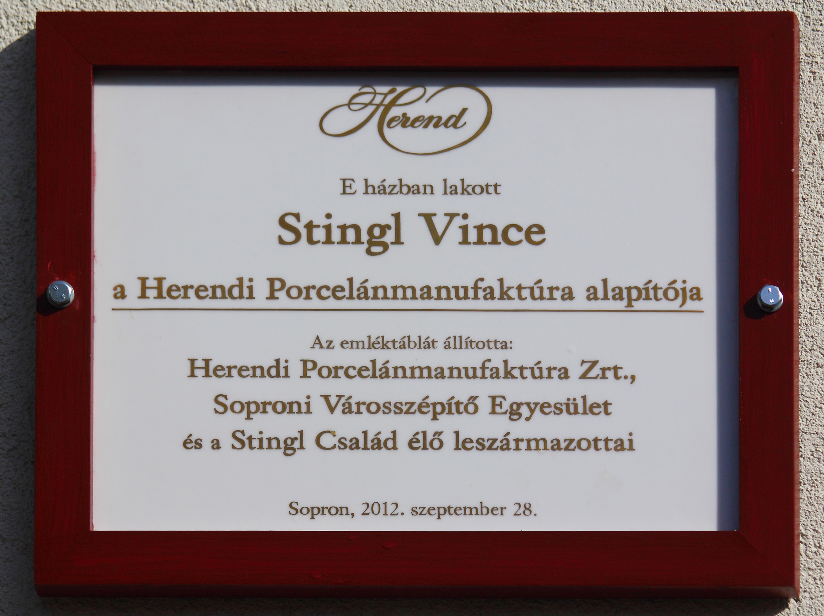 Stingl Vince emléktáblája a soproni szülőházán az avatáskor. Sopron, Várkerület 53.